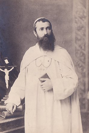 Mgr Léon Livinhac des Pères blancs en 1885, sacré évêque en septembre 1884.